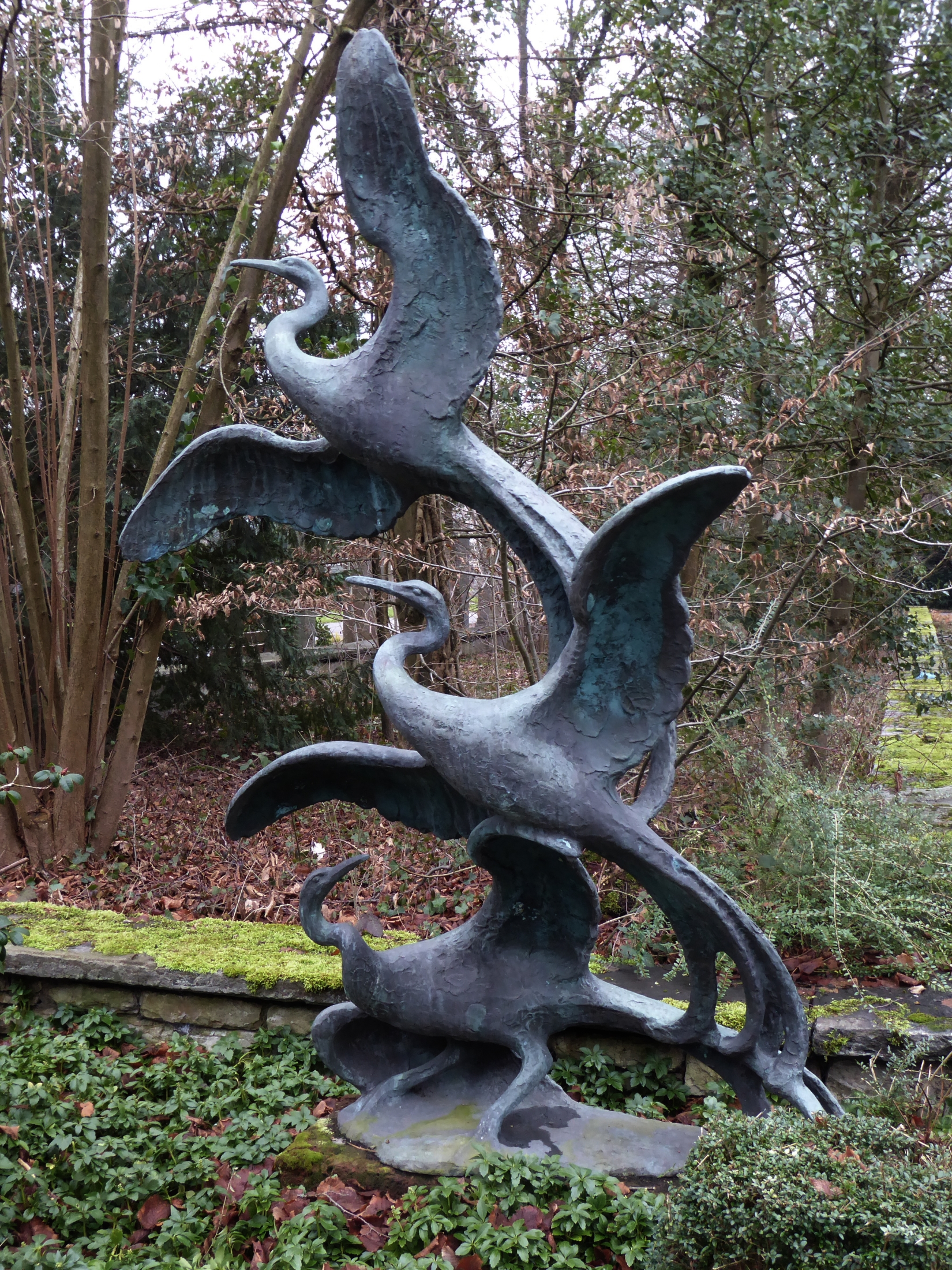 Michael Rudolf Wening (1893–1970) Grabskulptur, Friedhof am Hörnli, Basel